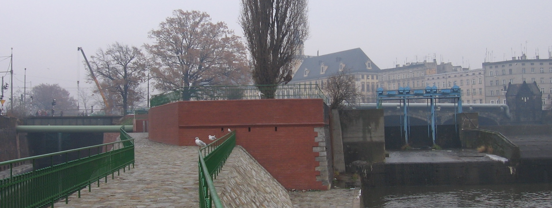 Wrocław, Poland lower weir of southern Odra River and Mosty Mieszczańskie (Mieszczańskie Bridges)